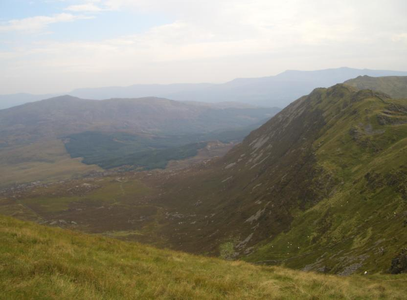 crib y rhiw